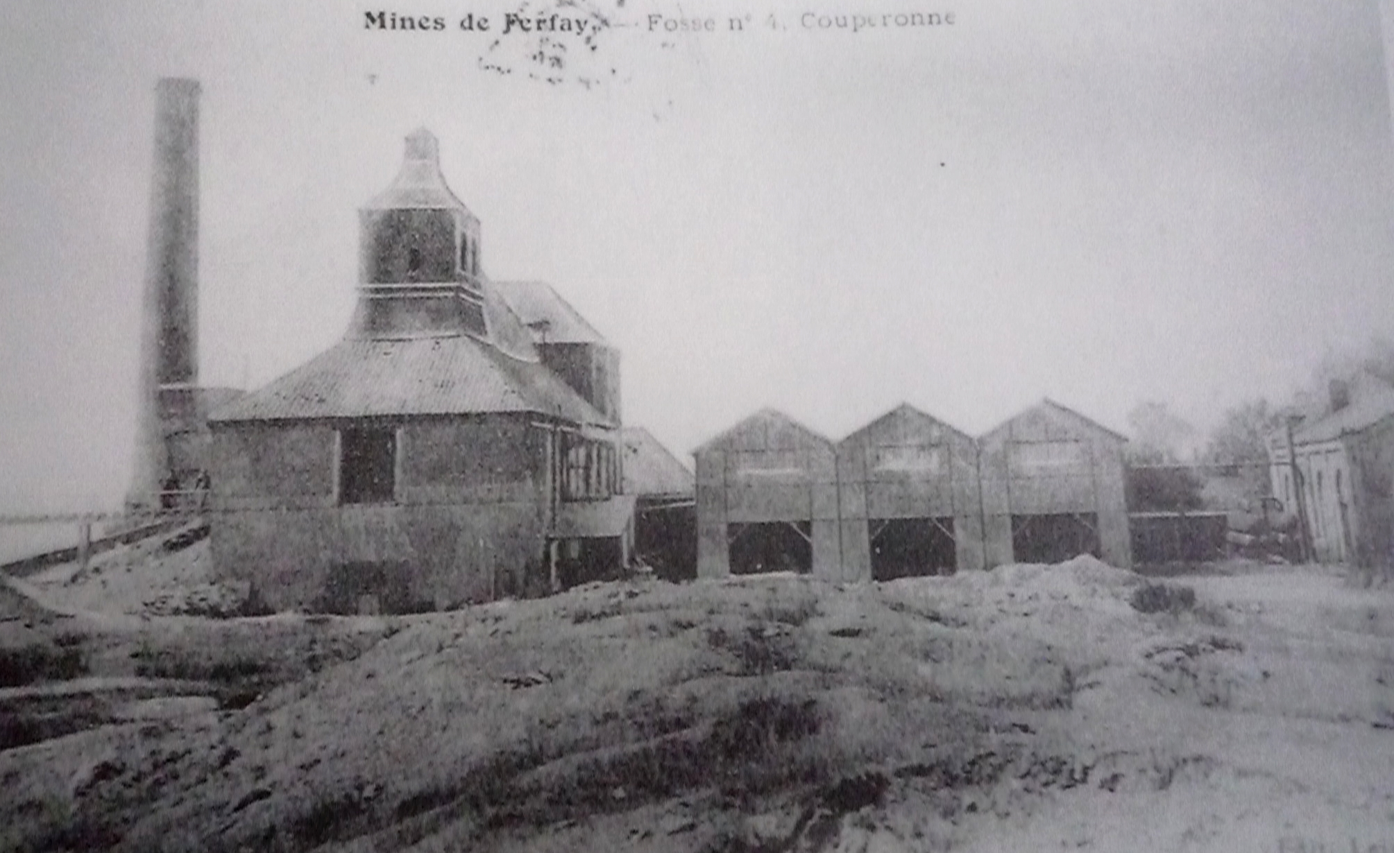 La Fosse n° 4 - 4 bis de la Compagnie des mines de Cauchy-à-la-Tour, de la Compagnie des mines de Ferfay puis de la Compagnie des mines de Marles était un charbonnage constitué de deux puits situé à Cauchy-à-la-Tour, Pas-de-Calais, Nord-Pas-de-Calais, France.